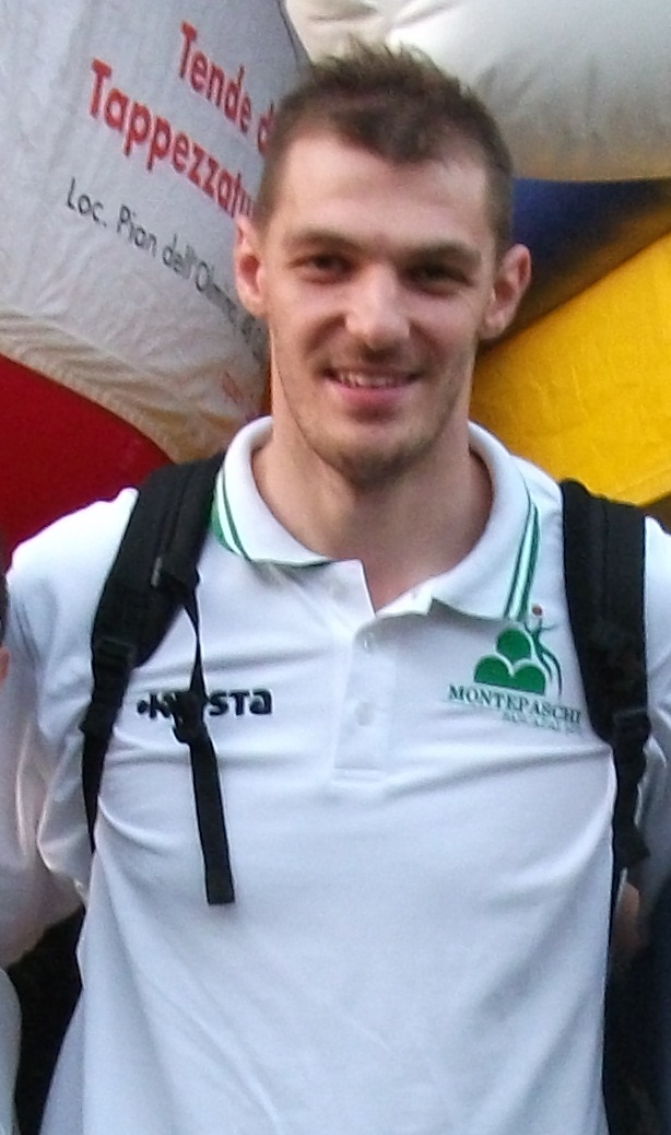 Luca Lechthaler durante i festeggiamenti del 21 giugno 2013 per lo scudetto 2012/13 vinto della Mens Sana Basket.